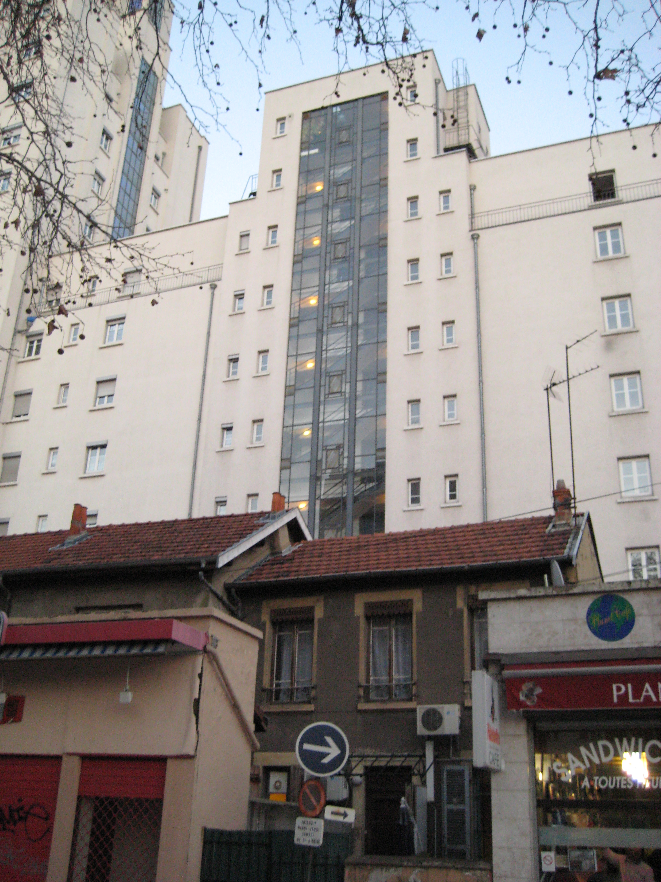 Les Gratte-ciel de Villeurbanne, maison ancienne et immeuble nouveau